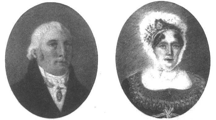 Lars och Anna Katarina Fresk around 1812. Owners of Elfviks gård, Lidingö, Sweden from 1796 to 1829.